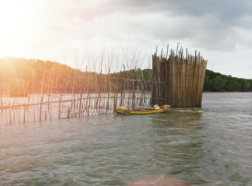 Pesca